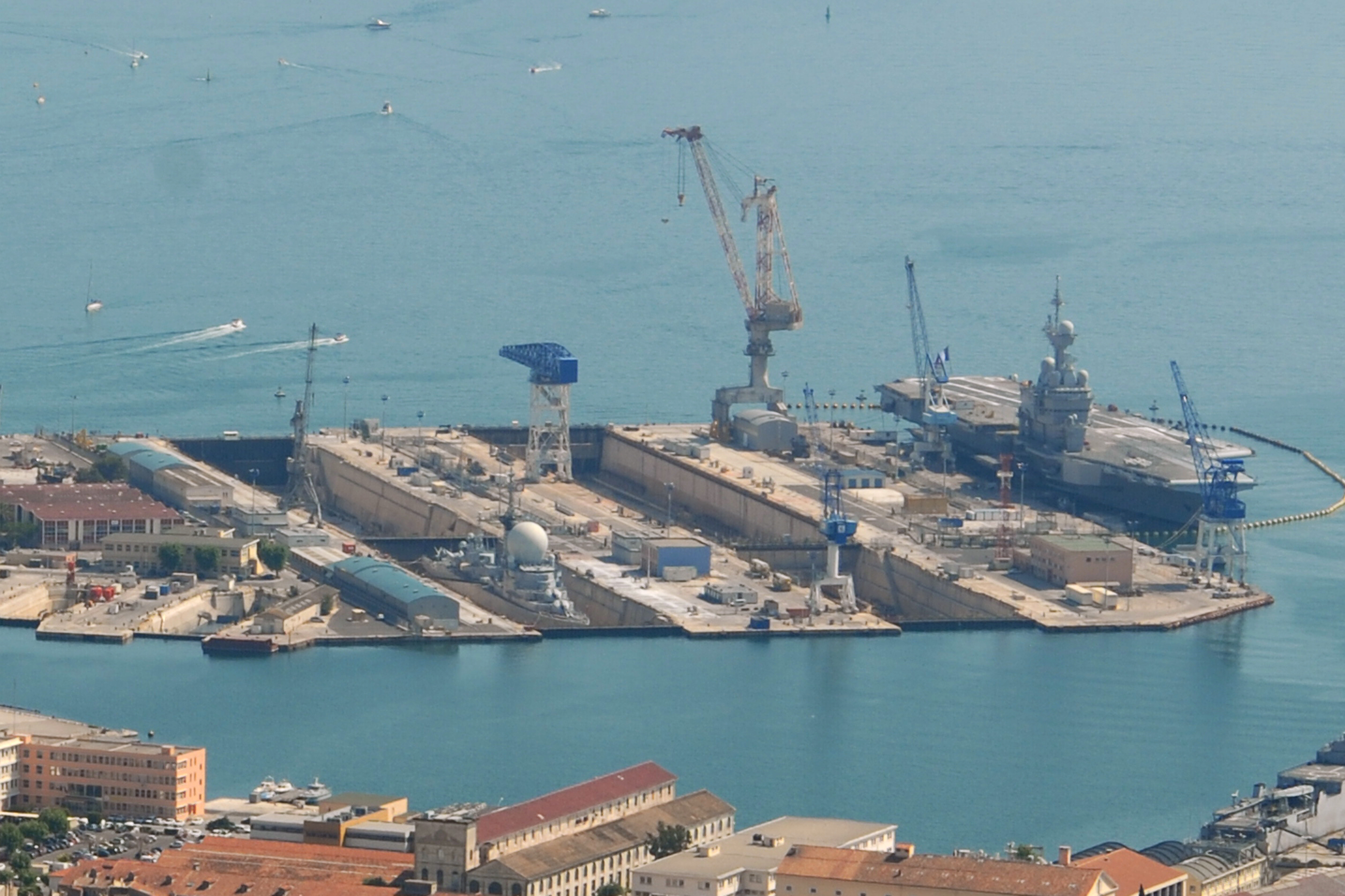 Porte avion charle de gaulle a quai a toulon